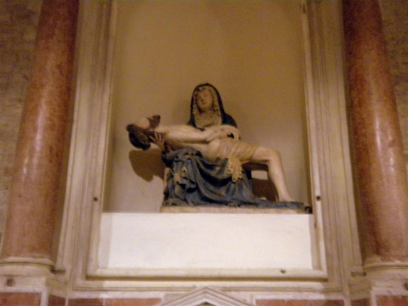 Pietà nella chiesa di Santa Sofia a Padova